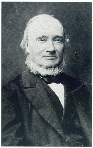 Carl Christian Wischmanns portrett av Ivar Aasen fra 1881